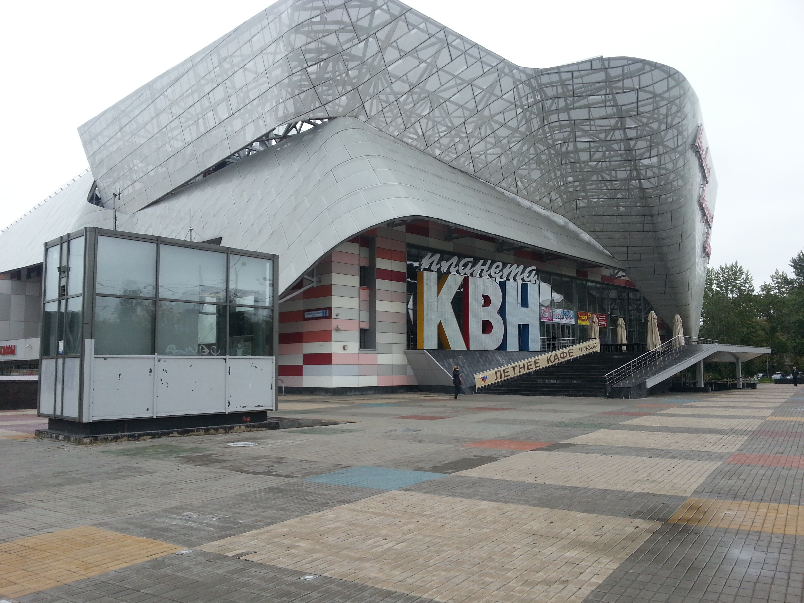 Здание Московского центра "Планета КВН". 16 сентября 2016г.